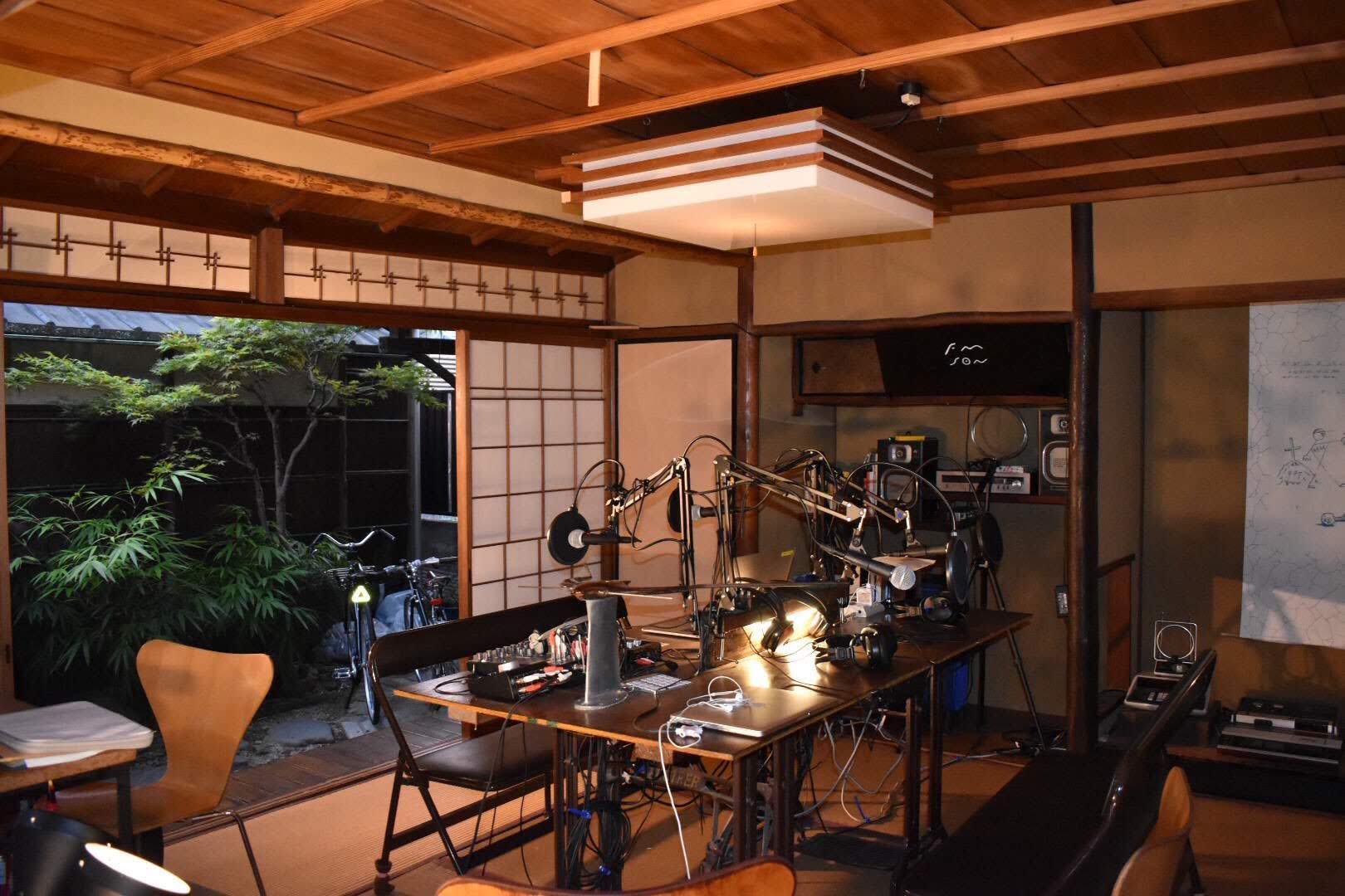 FM SONという、オフィス内ラジオ局。CEKAIオフィスがある東京、京都、LAを結ぶ。